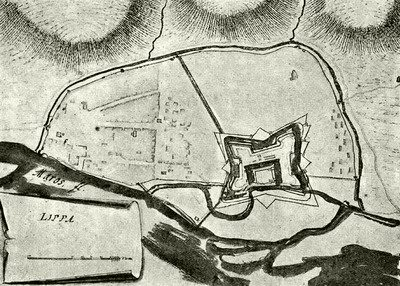 MÁRKI SÁNDOR DÓSA GYÖRGY 1470-1514 A MAGYAR TUDOMÁNYOS AKADÉMIA SEGÉLYEZÉSÉVEL KIADJA A MAGYAR TÖRTÉNELMI TÁRSULAT SZERKESZTI DR. DÉZSI LAJOS BUDAPEST AZ ATHENAEUM R.-T. KÖNYVNYOMDÁJA 1913